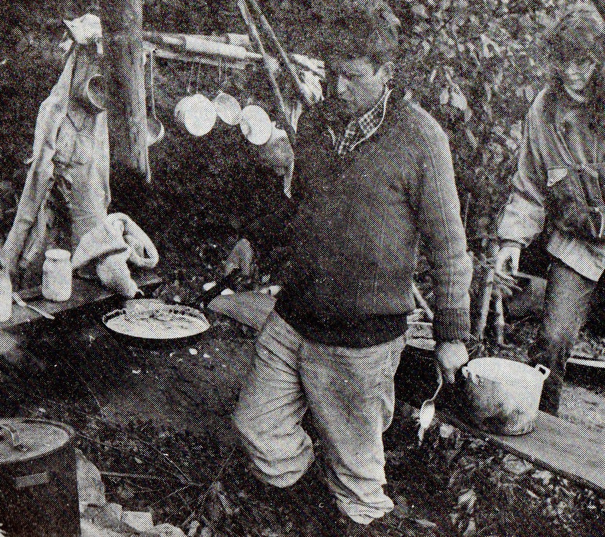 Leon Hojniak - krajoznawca z Legnicy około 1988r.